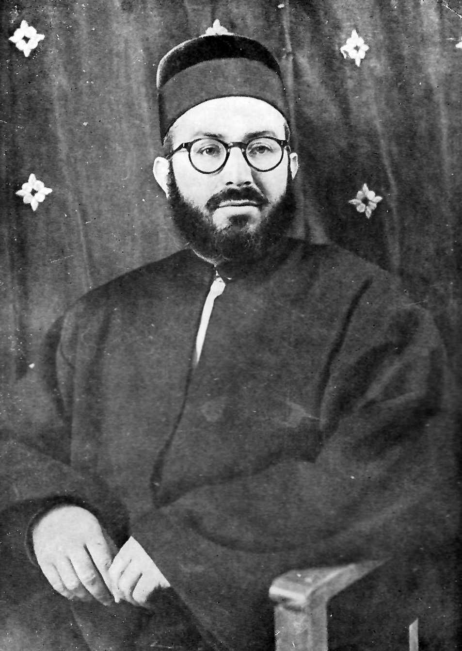 רבי דוד עובדיה בזמן היותו רבה הראשי של העיר צפרו במרוקו